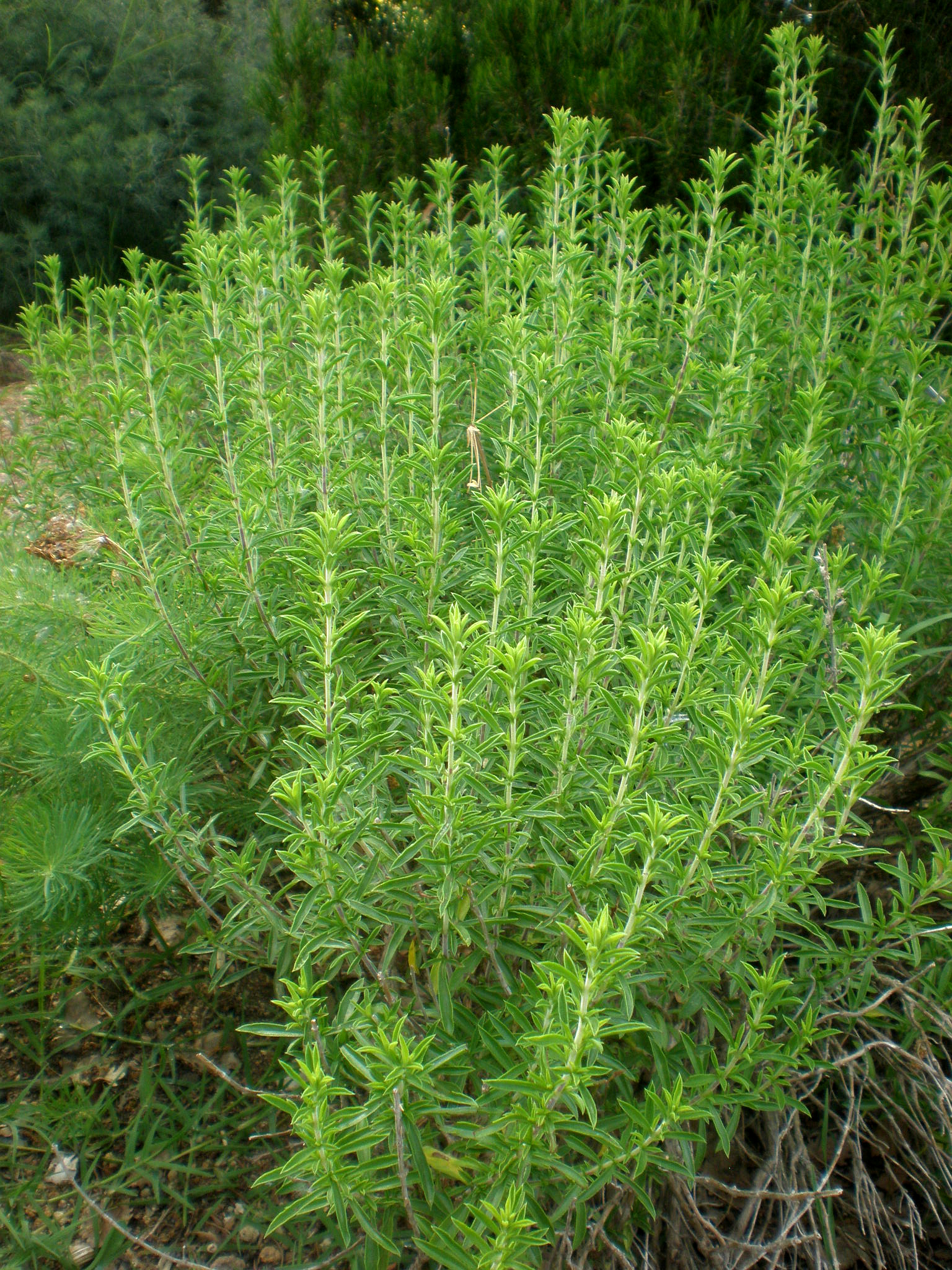 Jardín Botánico de Barcelona.